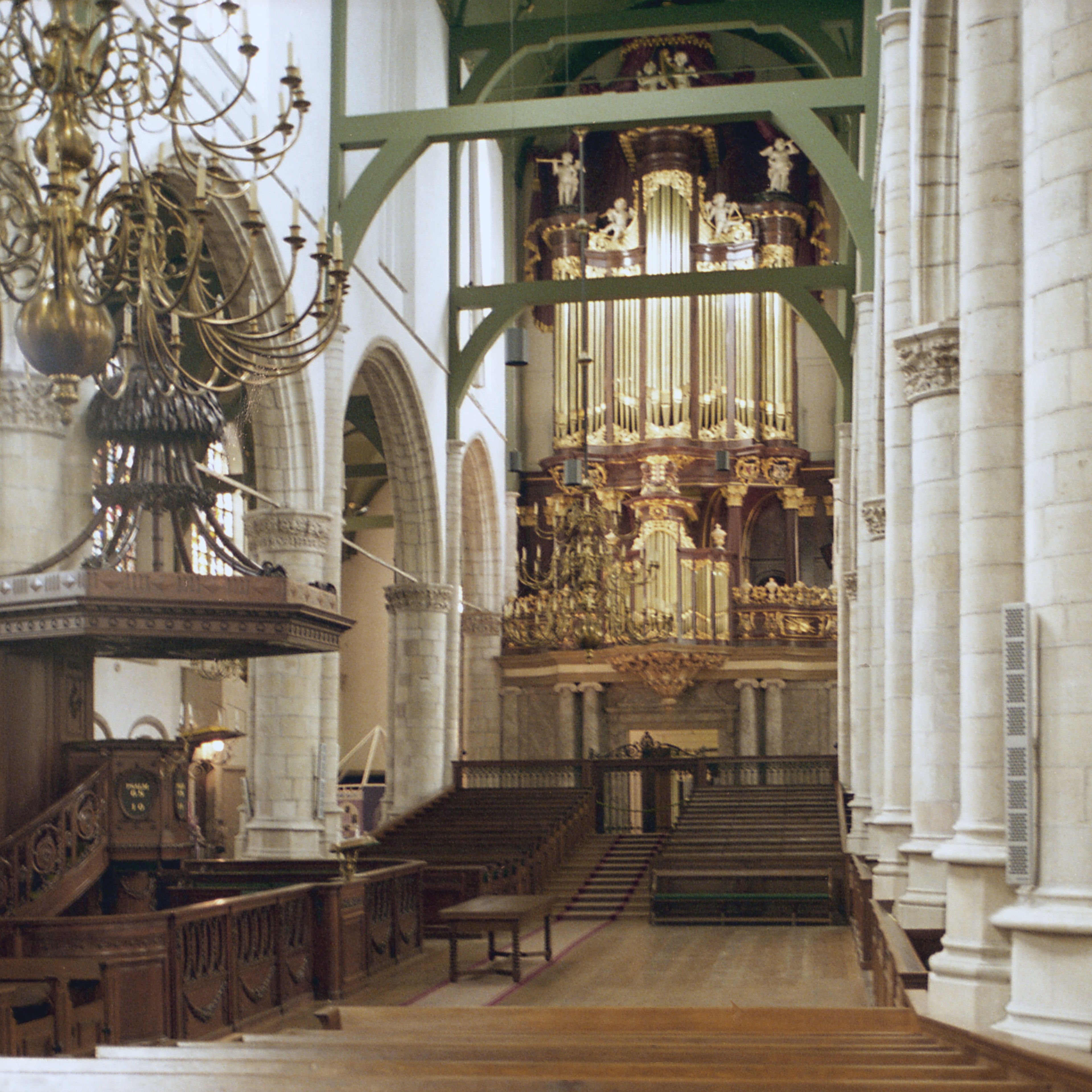 Schip kijken naar west